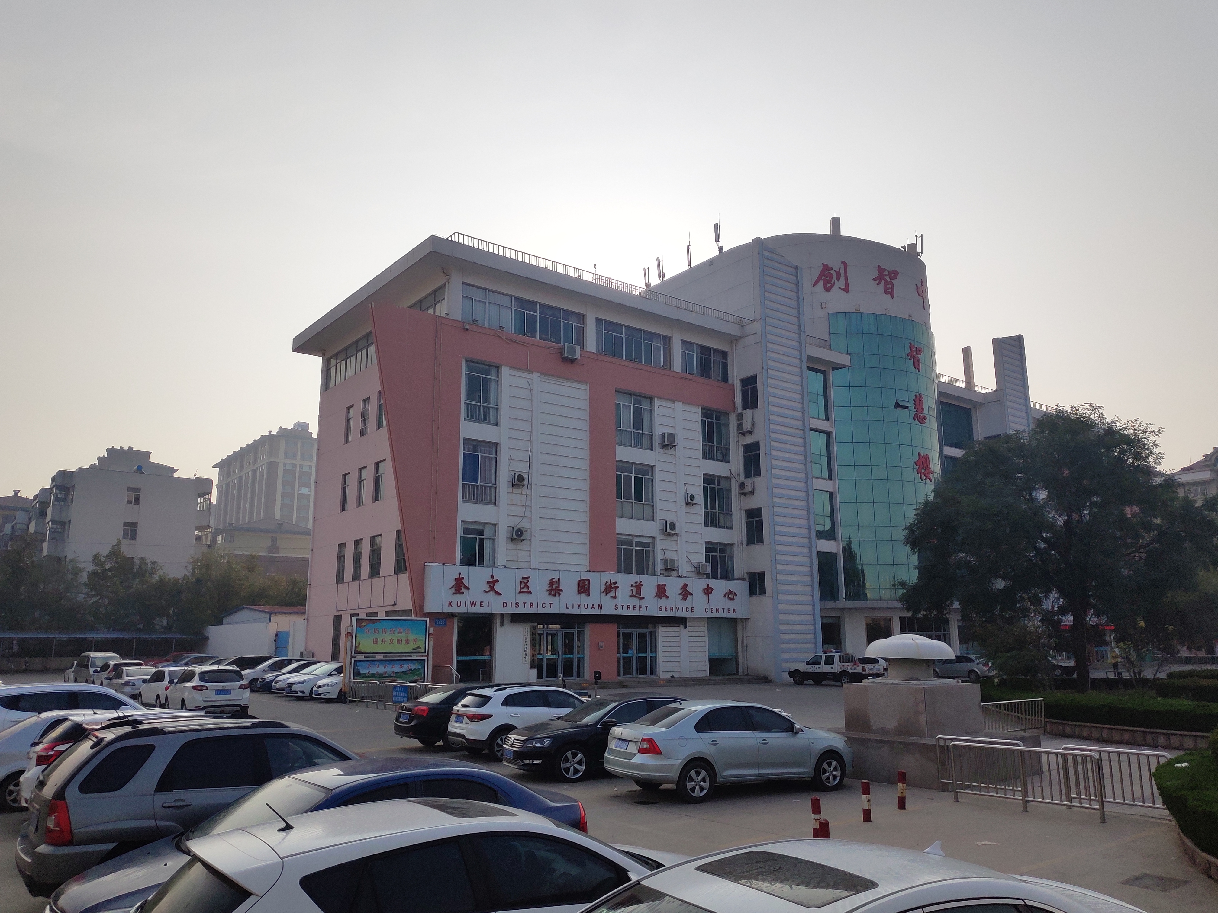 中文（中国大陆）: 奎文区梨园街道服务中心